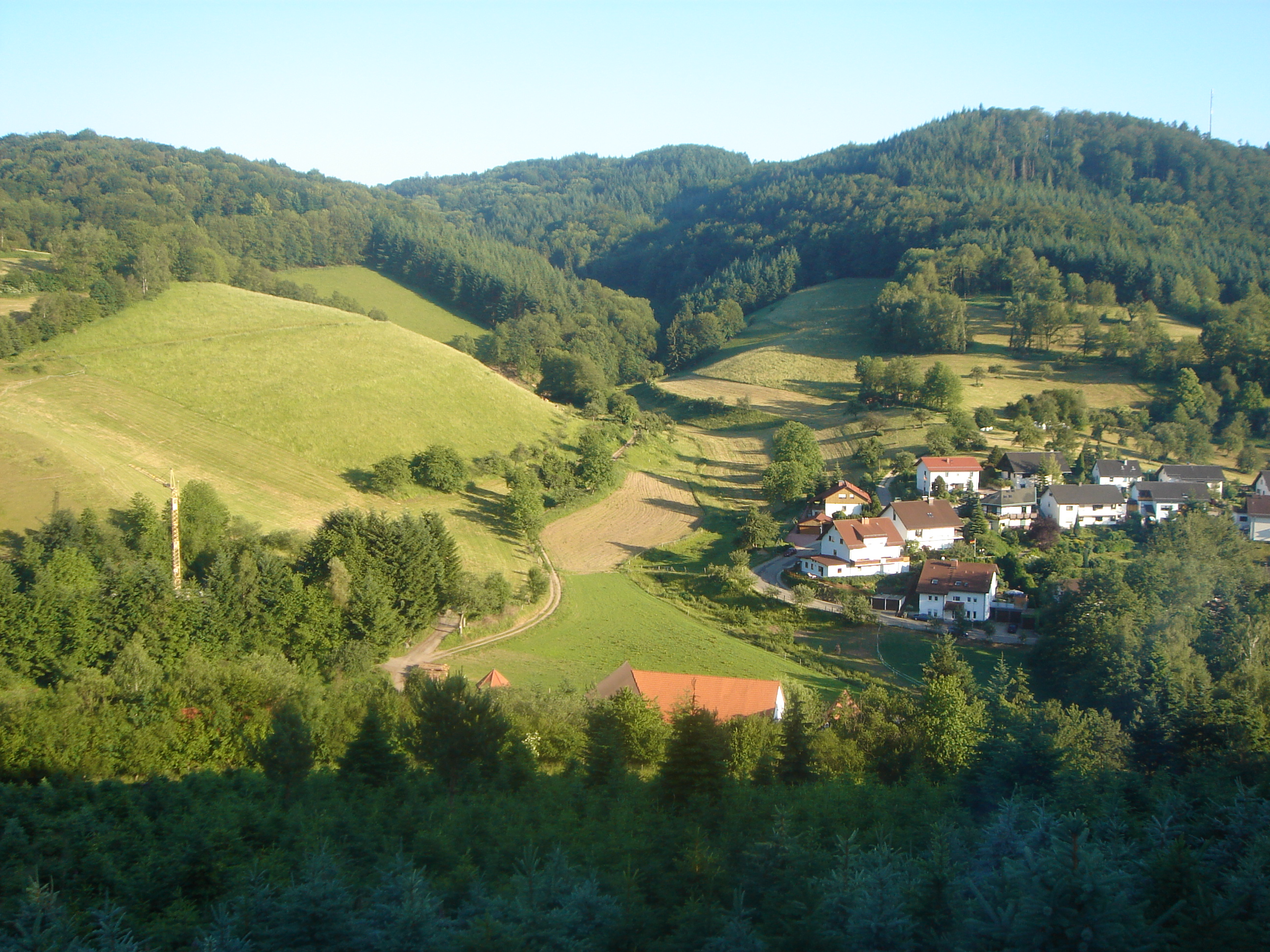 Blick auf den Daumberg vom Waldskopf aus